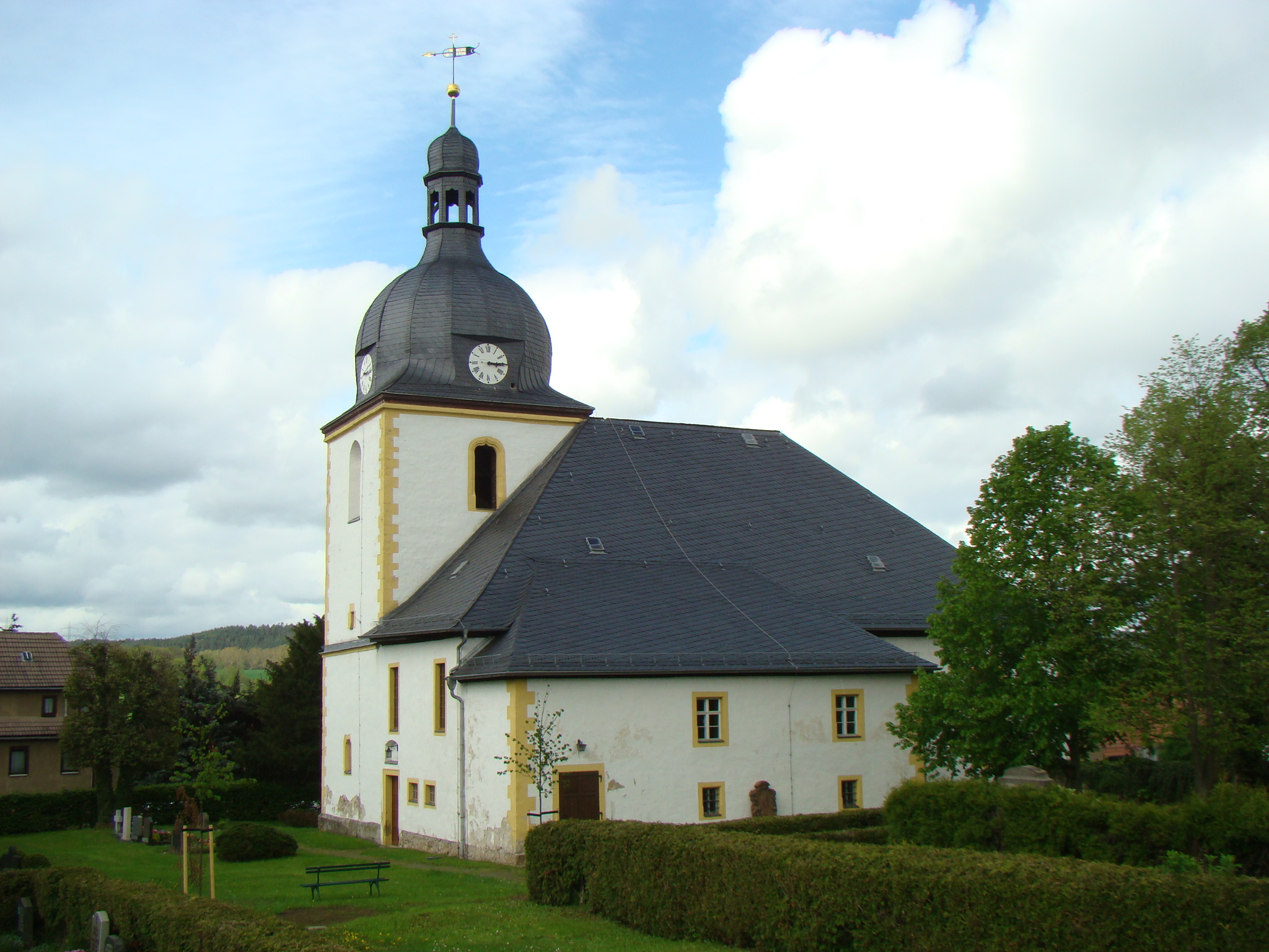 Stadtkirche Oppurg